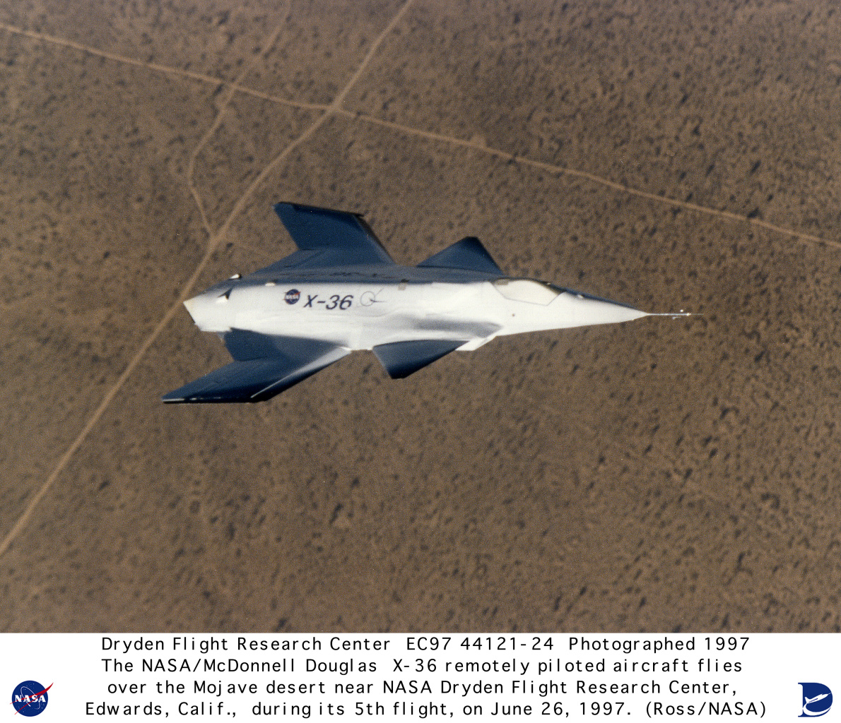 X-36 volando sobre el Desierto de Mojave. 26 de junio de 1997